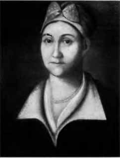 Авдотья Матвеевна Гончарова (1785—1851) - мать писателя И. А. Гончарова